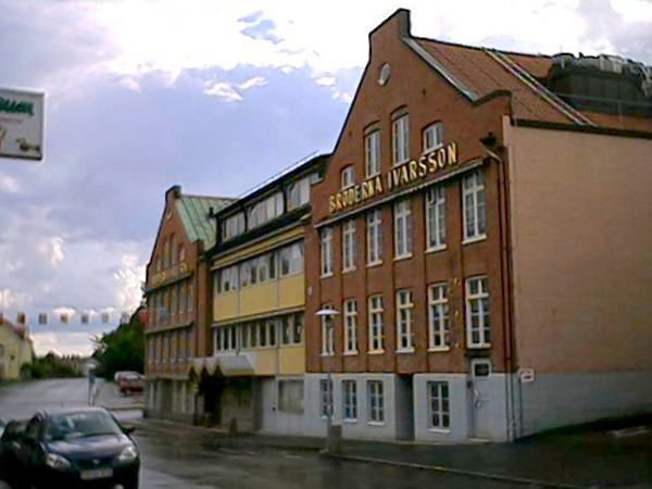 BRIO:s byggnad i centrala Osby. Fotograf: Väsk.